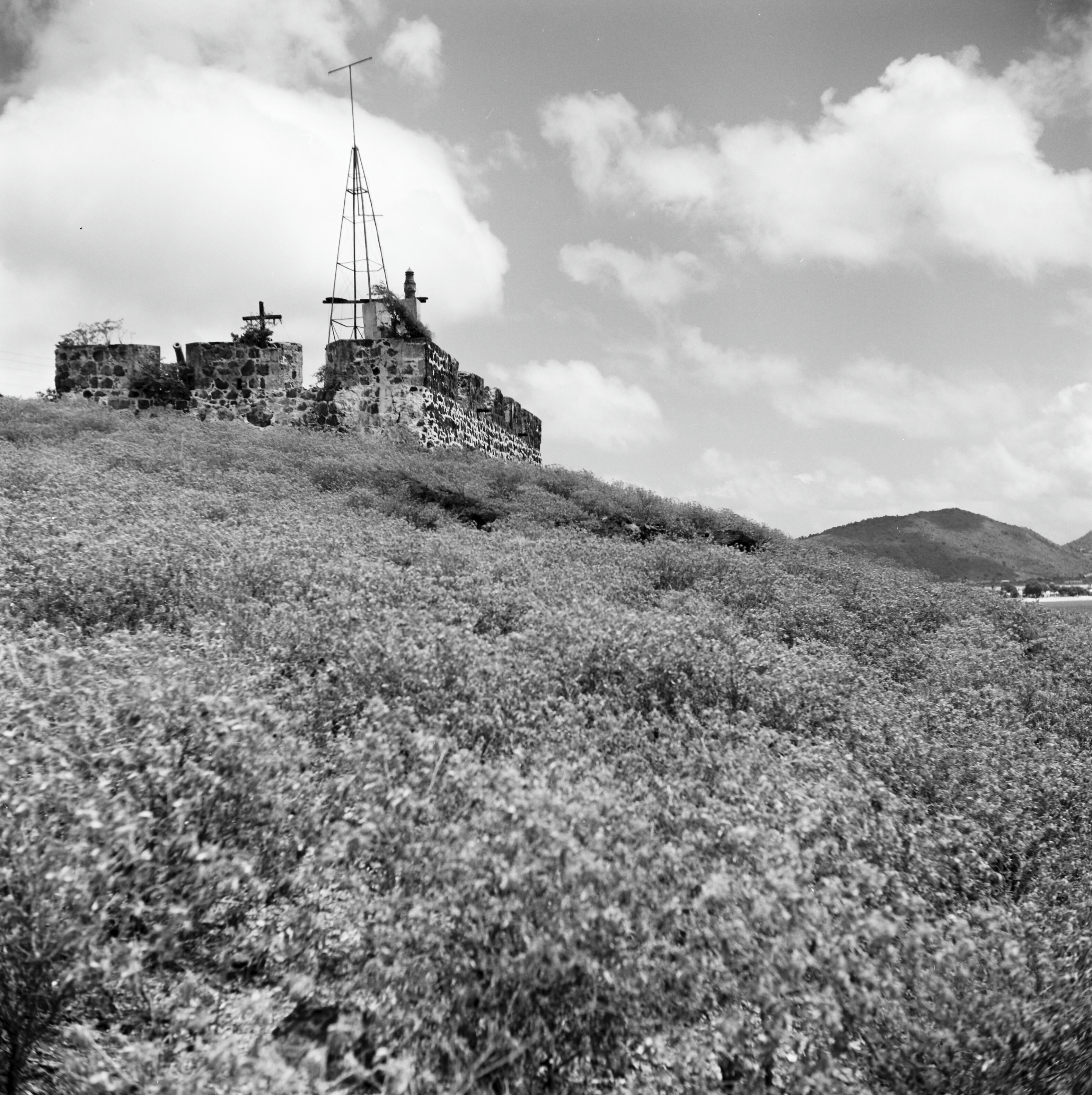 Overzicht bewaard gebleven bastionOnderwerp: bastions